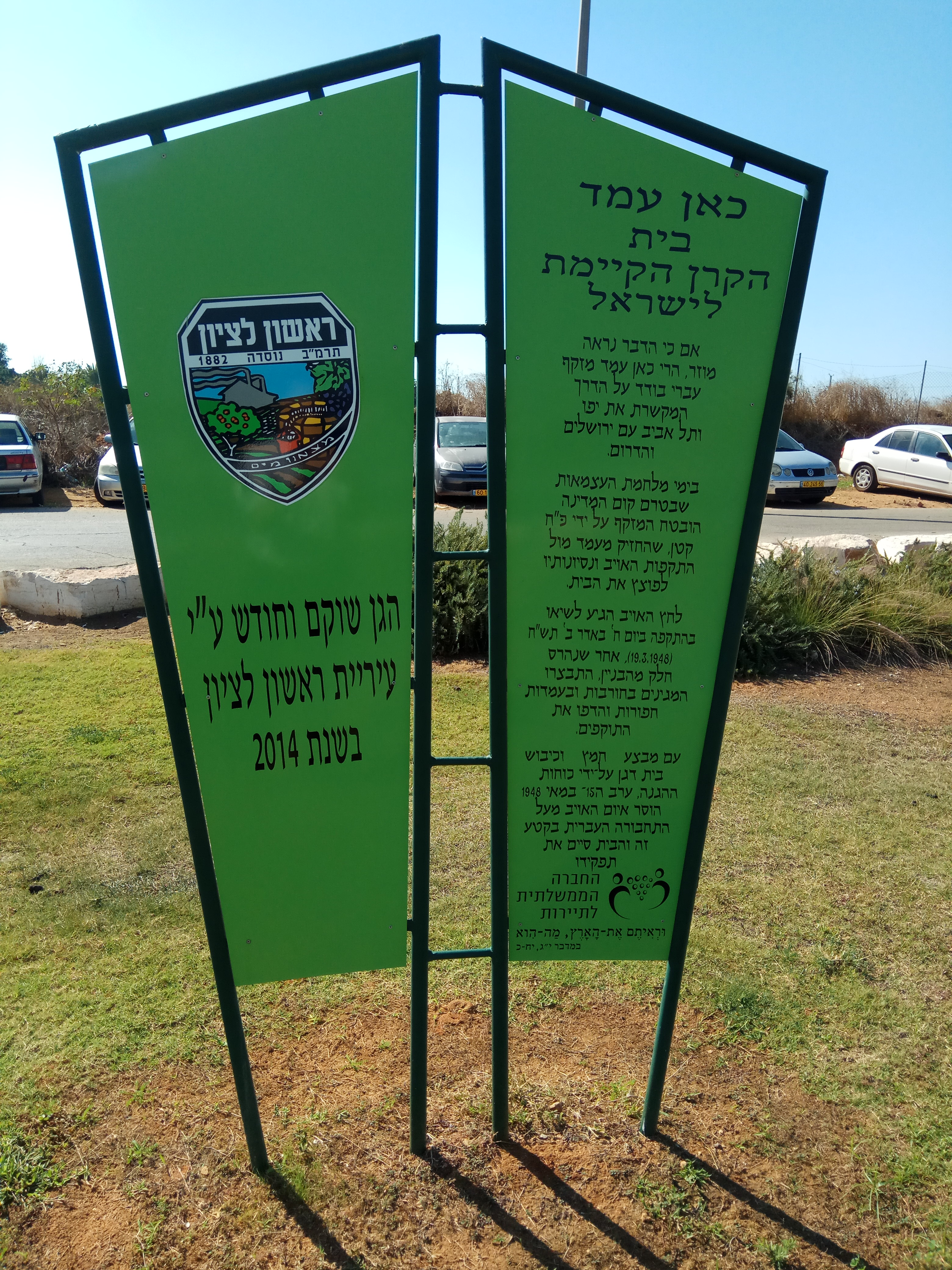 שלט באתר בית הקרן הקיימת בצומת בית דגן